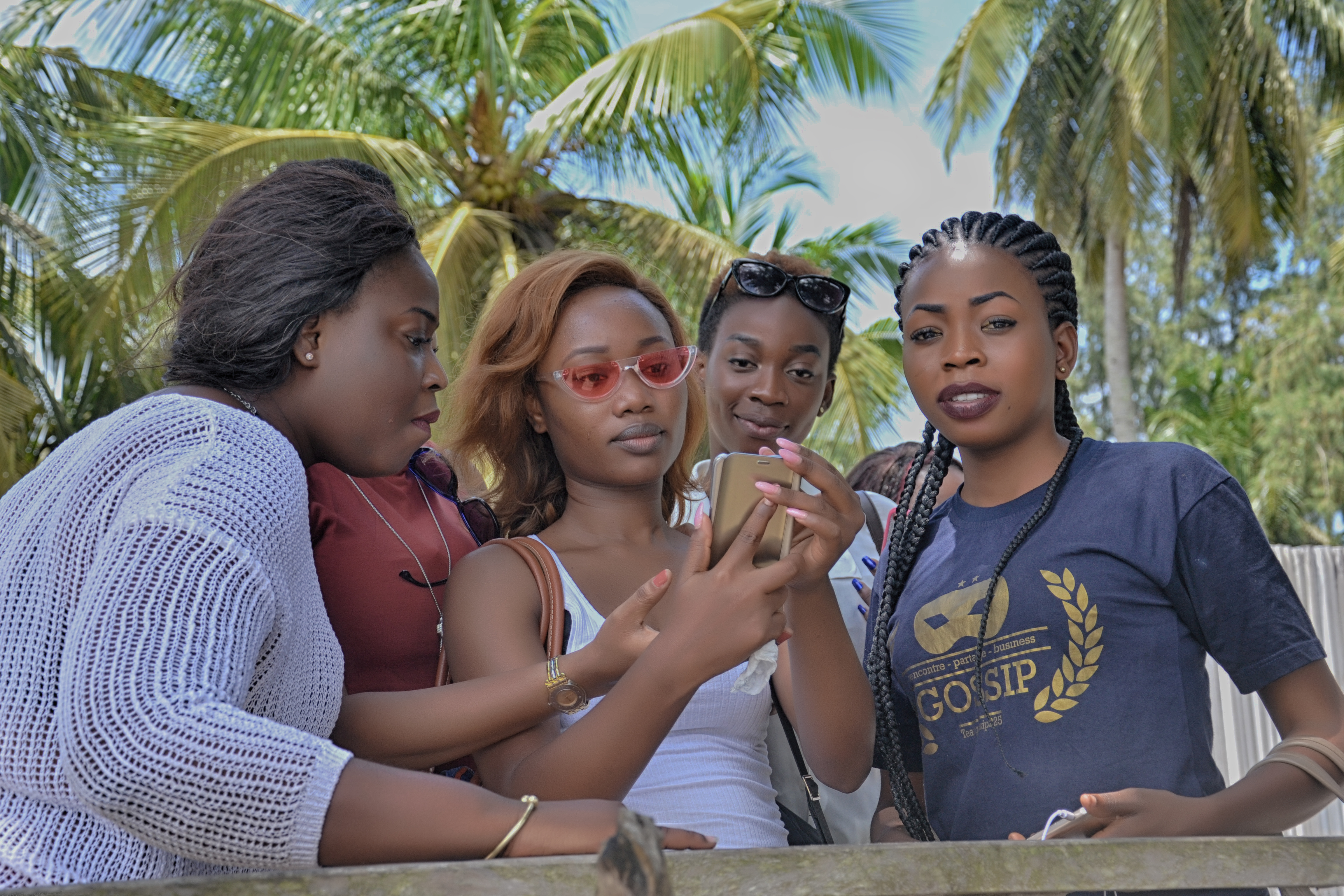 Un groupe de jeunes femmes avec un téléphones intelligents en plein manipulation This is an image with the theme "Africa on the Move or Transport" from: Ivory Coast